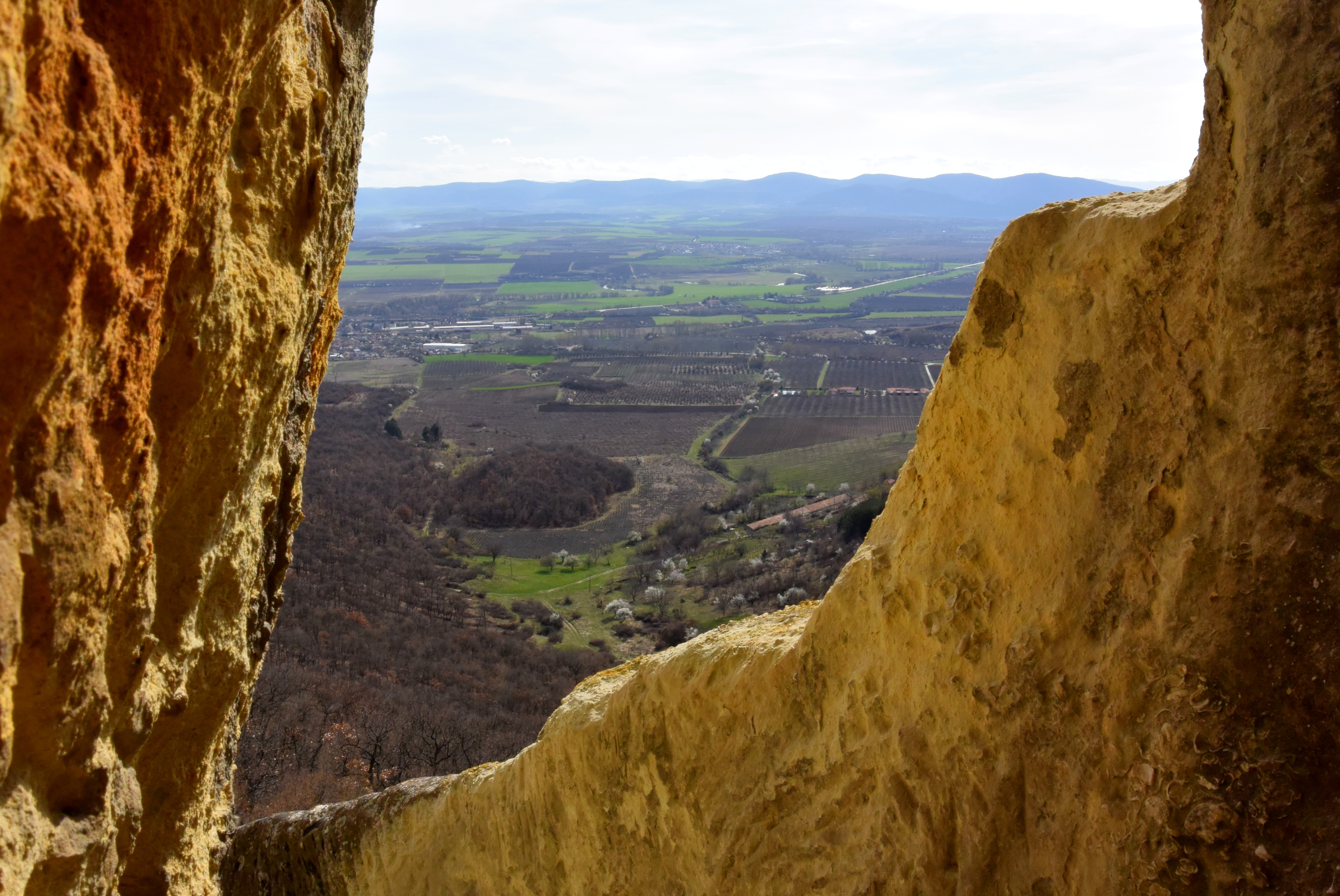 Шуменско плато